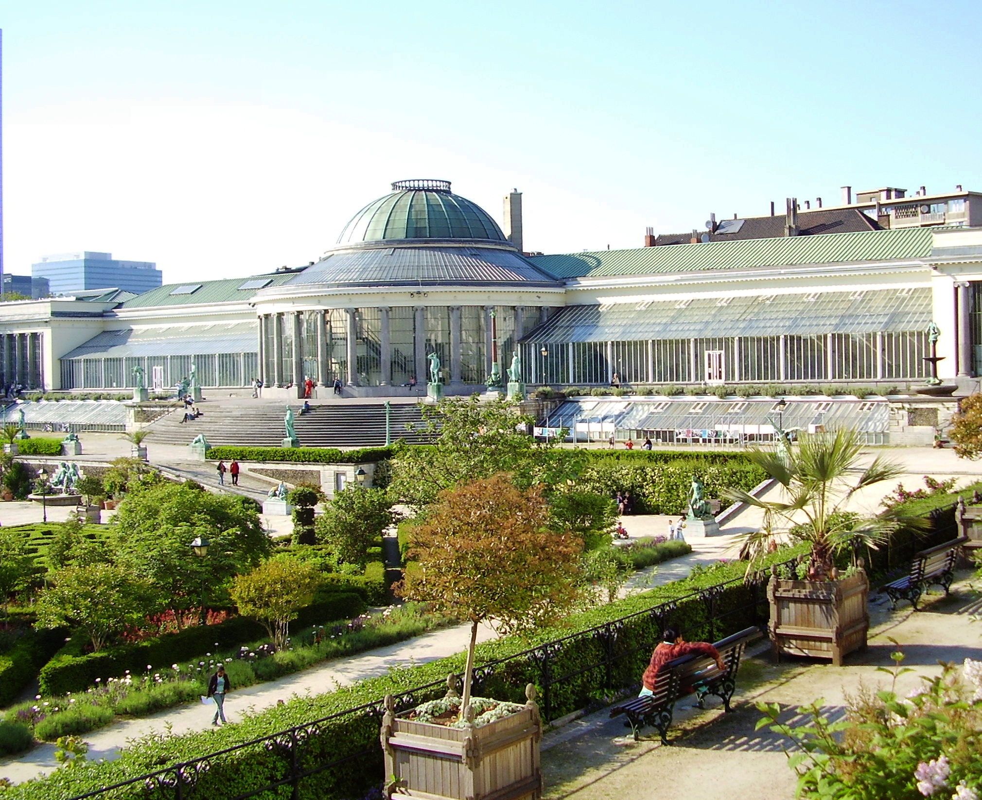 Description: Le Botanique, Saint-Josse-ten-Noode (Bruxelles) Author: User:Ben2 Date of creation: 22 juin 2006 Source: Photo personnelle